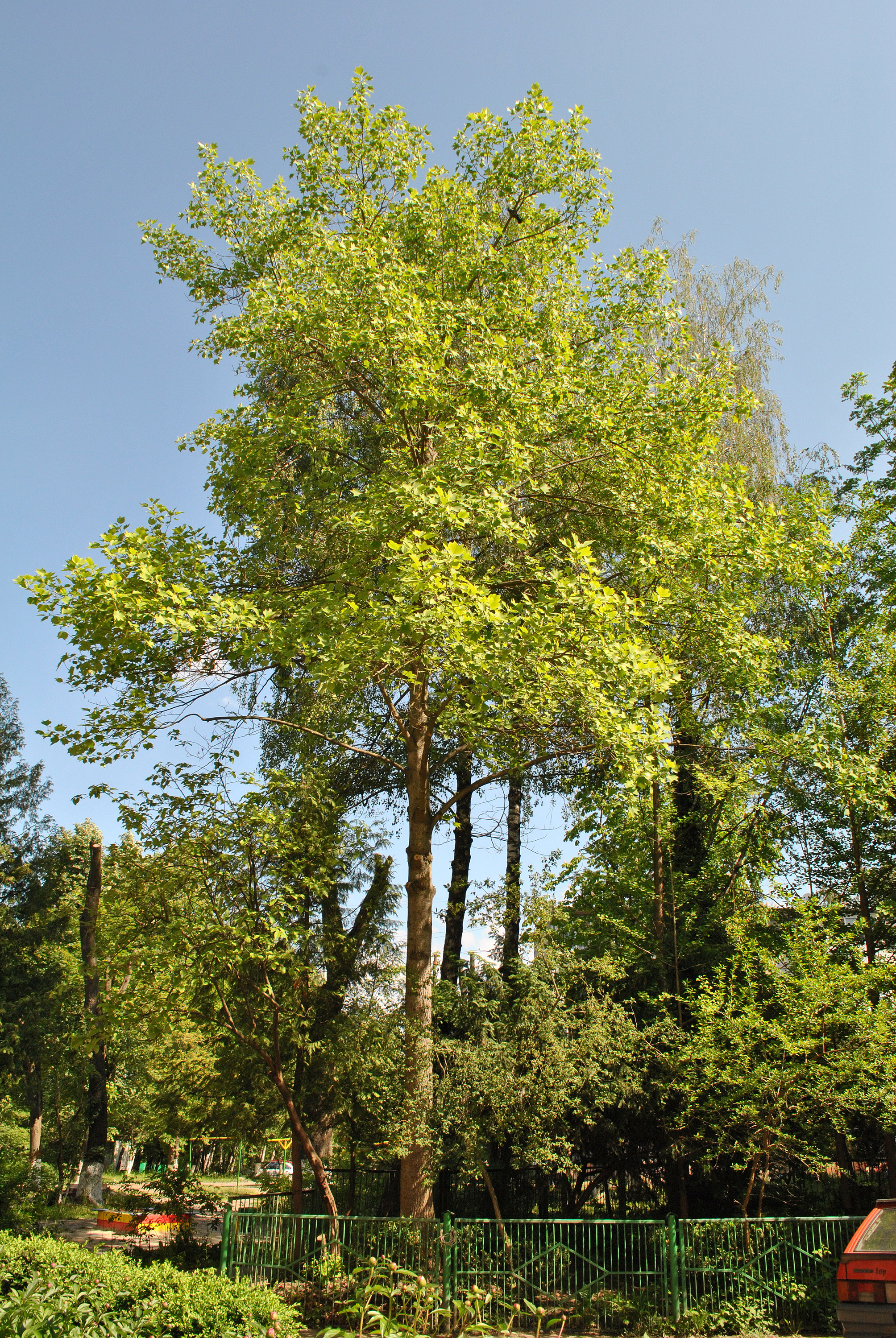 «Заповідний куточок імені Миколи Чайковського» — ботанічна пам'ятка природи місцевого значення у м. Тернопіль на подвір'ї будинку № 13 на вул. Володимира Винниченка.